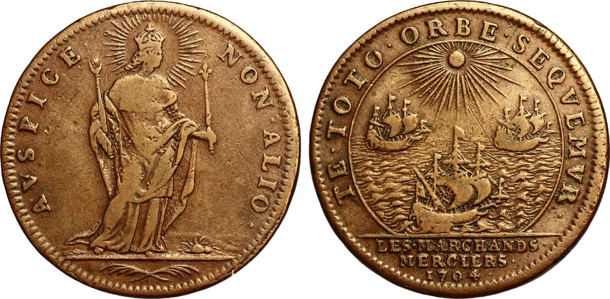 Jeton de la corporation des troisième corps des marchands, les merciers, tailleurs de draps, ouvriers en draps d’or, d’argent et de soie. Réputé le plus noble et le plus excellent, le troisième corps des marchands, les merciers, étaient des marchands proprement dits ; ils n'avaient pas de fabriques, tout au plus ajoutaient-ils quelques façons dernières aux marchandises qu'ils mettaient en vente. Ce sont des merciers que l'on trouve engagés dans les grandes et fameuses entreprises de navigation aux Indes qui ont marqué aux XVIe et au XVIIe siècles. Les trois navires rappellent l’appartenance des merciers au troisième corps des marchands.